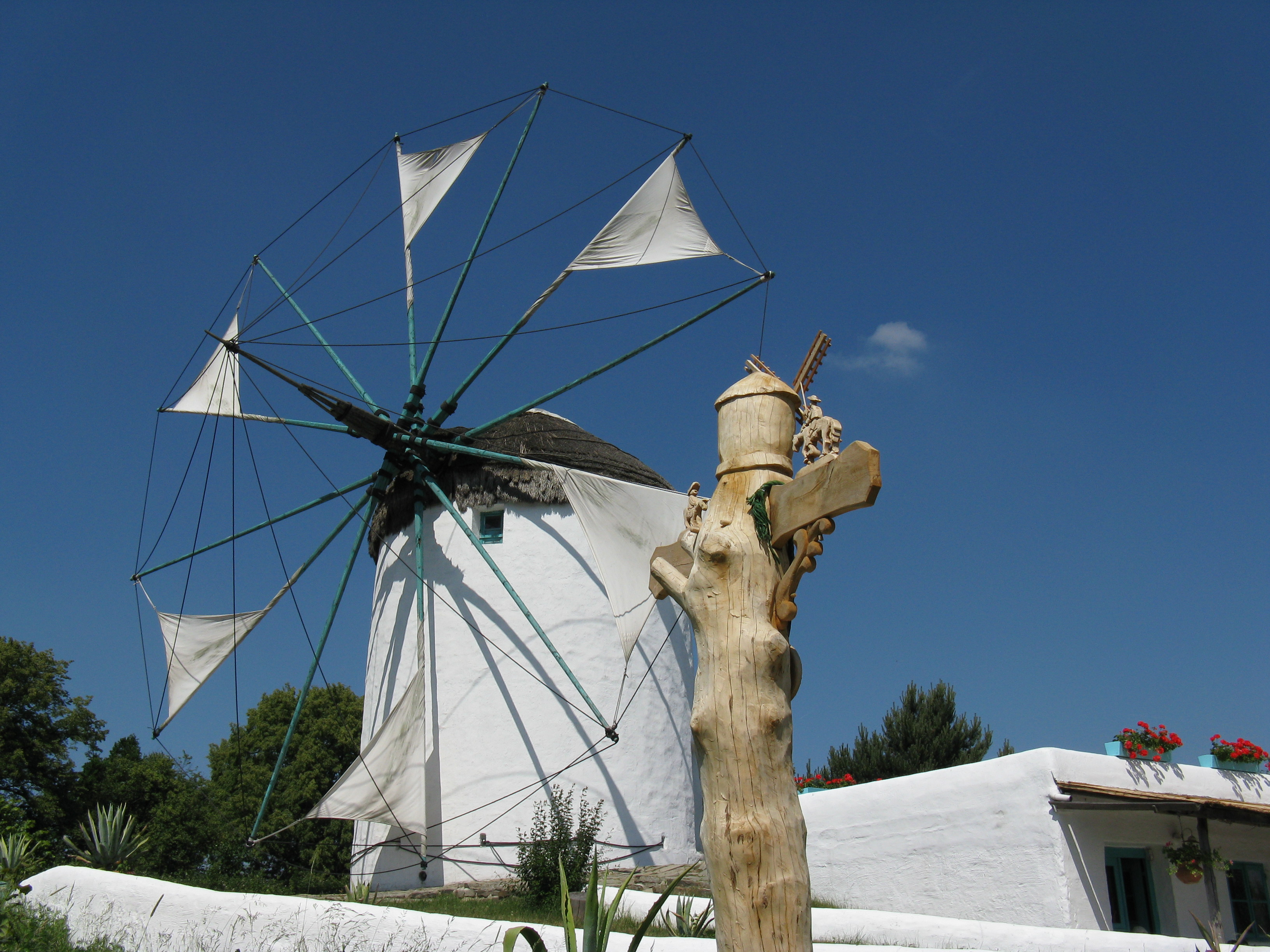 Mühlenmuseum Gifhorn: griechische Mühle